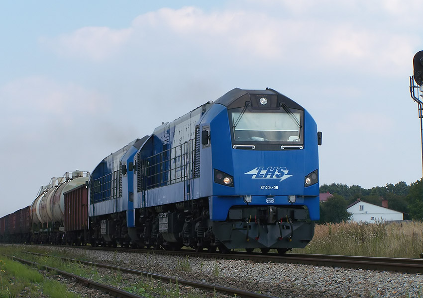 Dwie lokomotywy ST40s (na czele ST40s-09) ciągną skład na LHS.